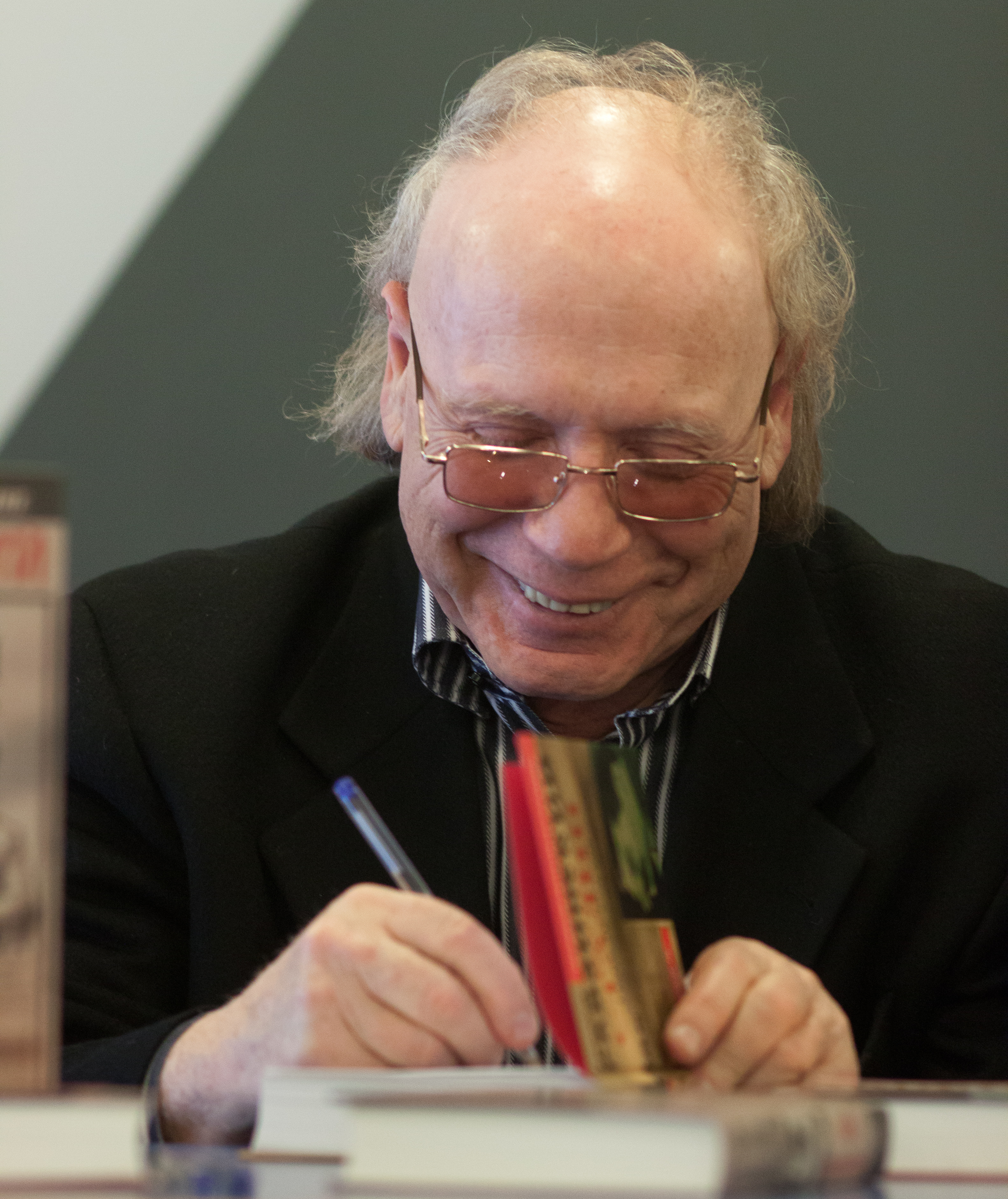 Эдвард Радзинский на презентации книги «Последняя загадка» в ТД "Москва" на Воздвиженке